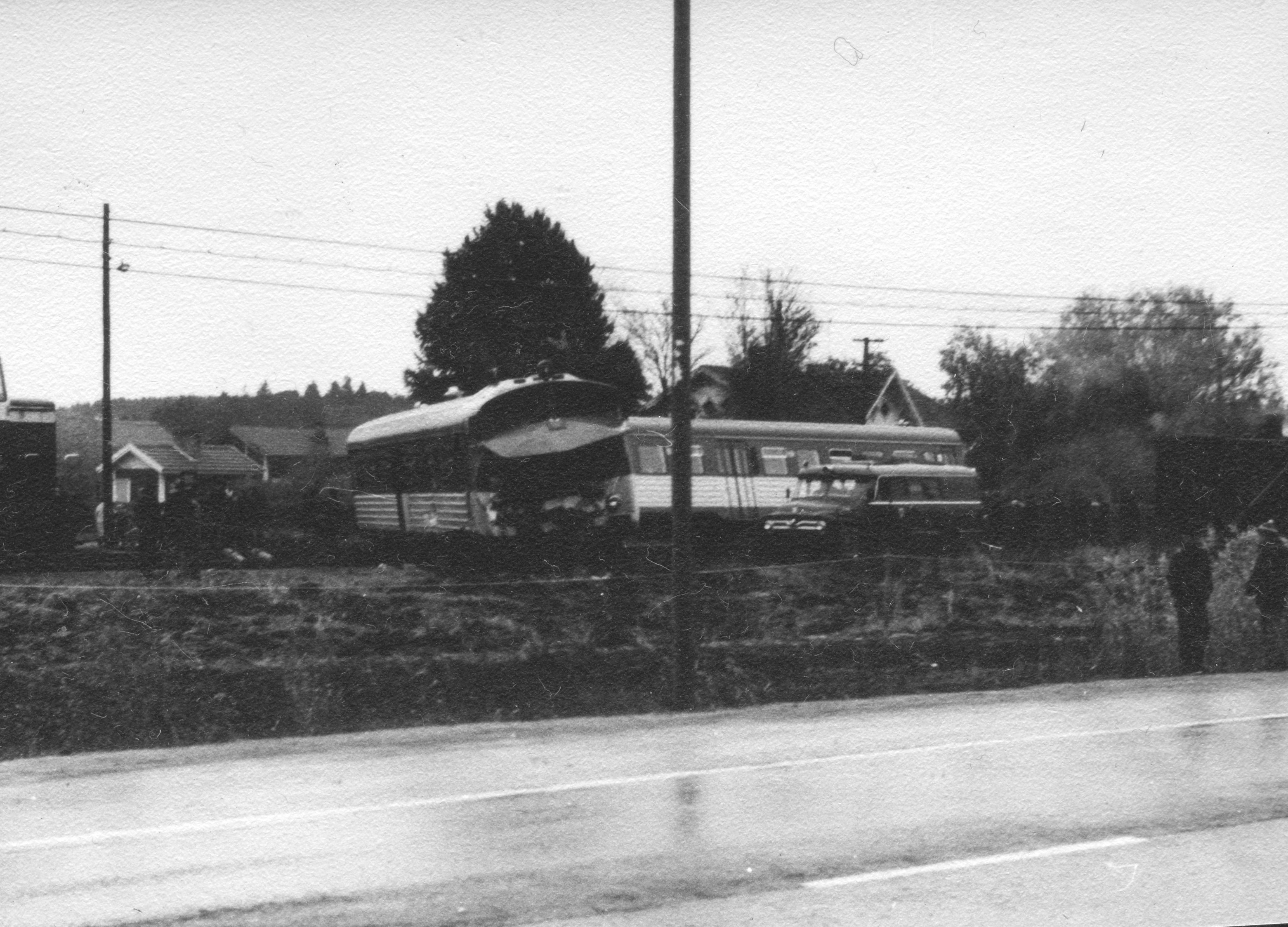 Piikkiön ratapihan pahin onnettomuus tapahtui 7.10.1966 jolloin rekka ajoi tasoristeyksessä junan eteen. Junan ensimmäinen moottorivaunu kääntyi poikittain ja välivaunu suistui kiskoilta. Veturin ja auton miehistöt loukkaantuivat.